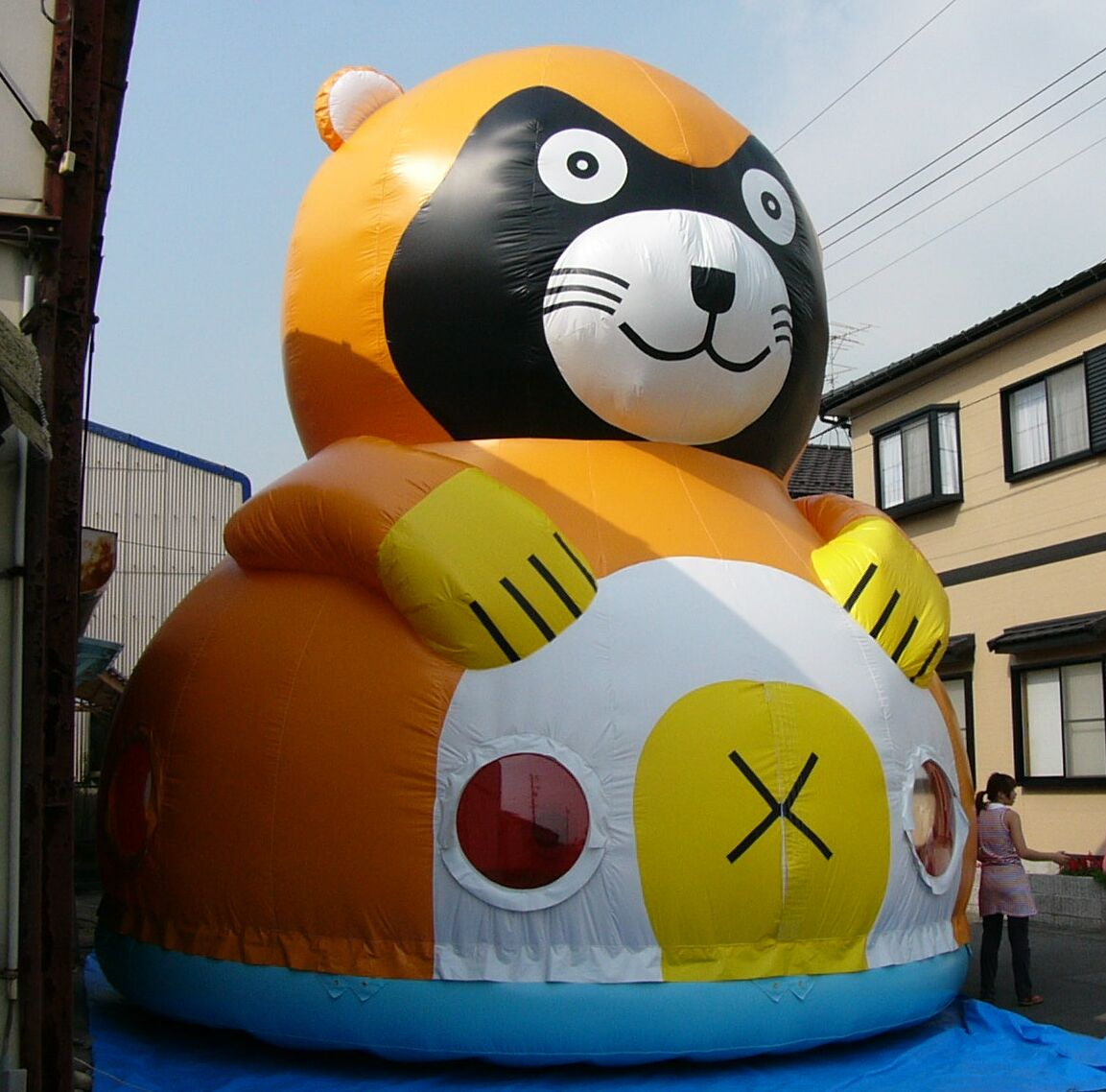 エア遊具：ドーム式 サイズWDΦ6000H6000 狸のキャラクター